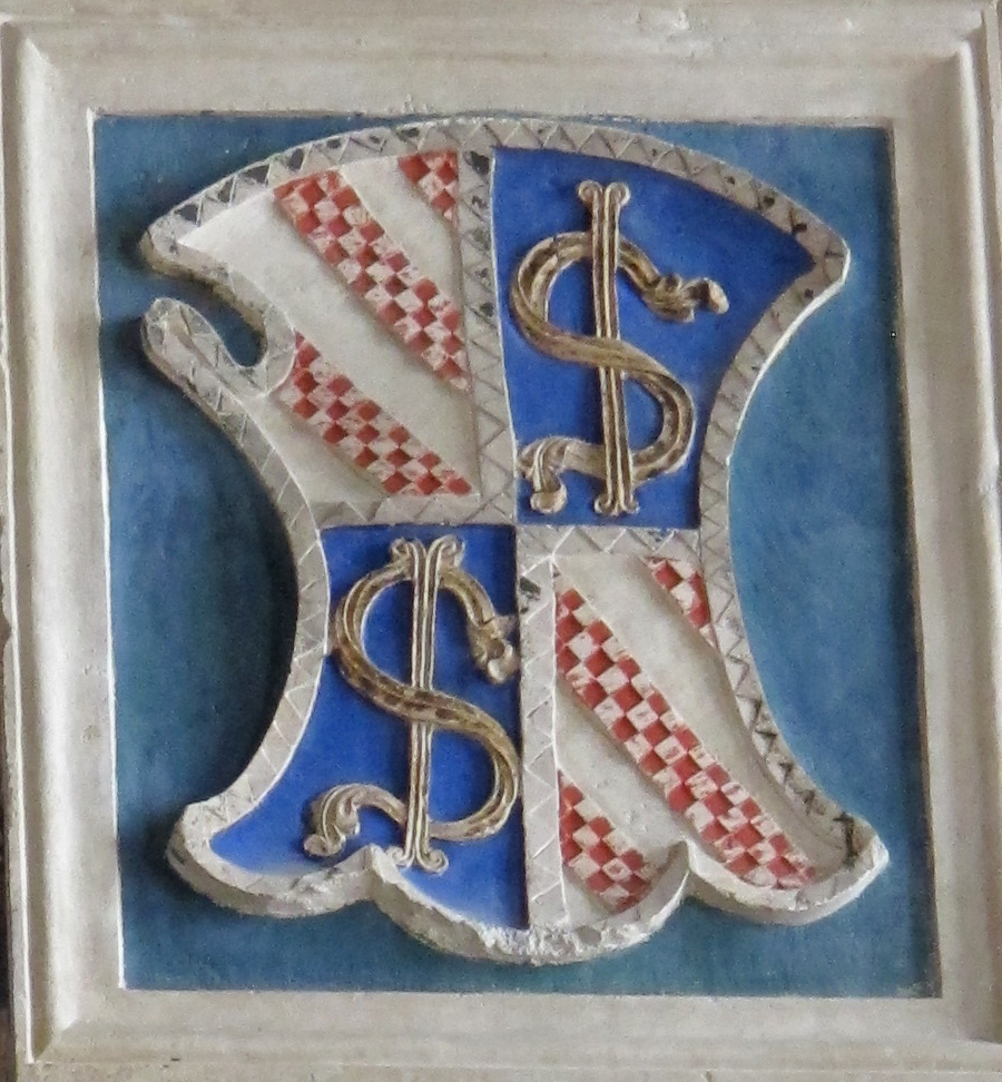 Tempio Malatestiano - MIBAC This is a photo of a monument which is part of cultural heritage of Italy.